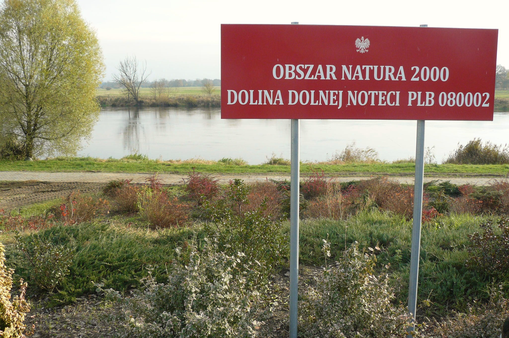 Ujście Noteci do Warty w Santoku.